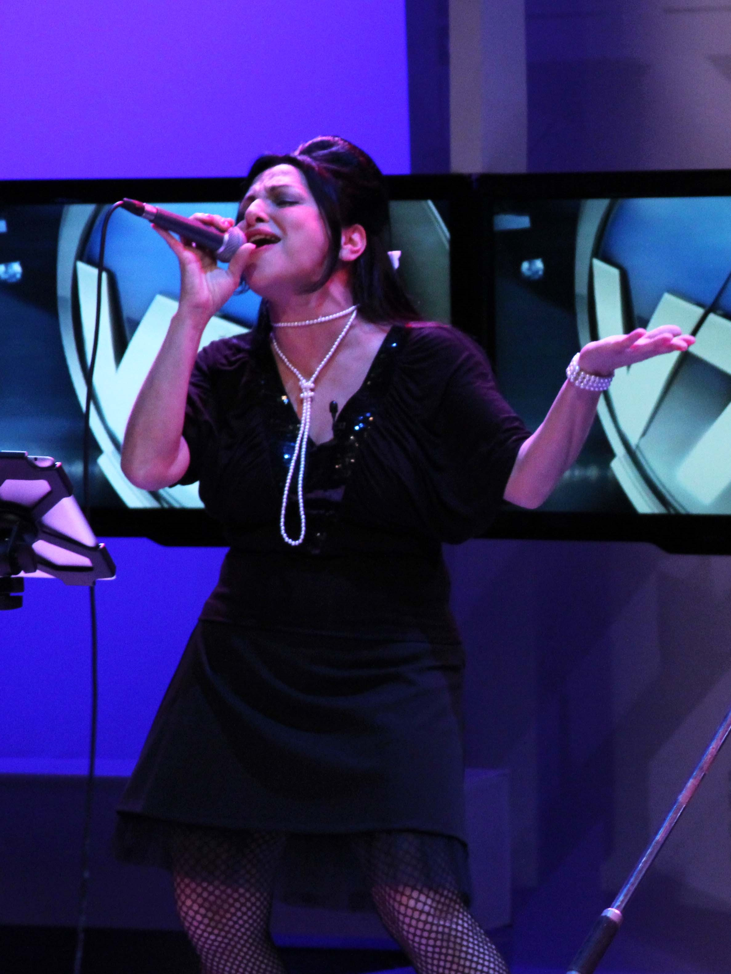 Mavi Díaz y su grupo, Viuda e Hijas de Roque Enroll, invitadas de Jueves de música en Visión Siete Resumen.30-10-2014. Foto: TVP 2014